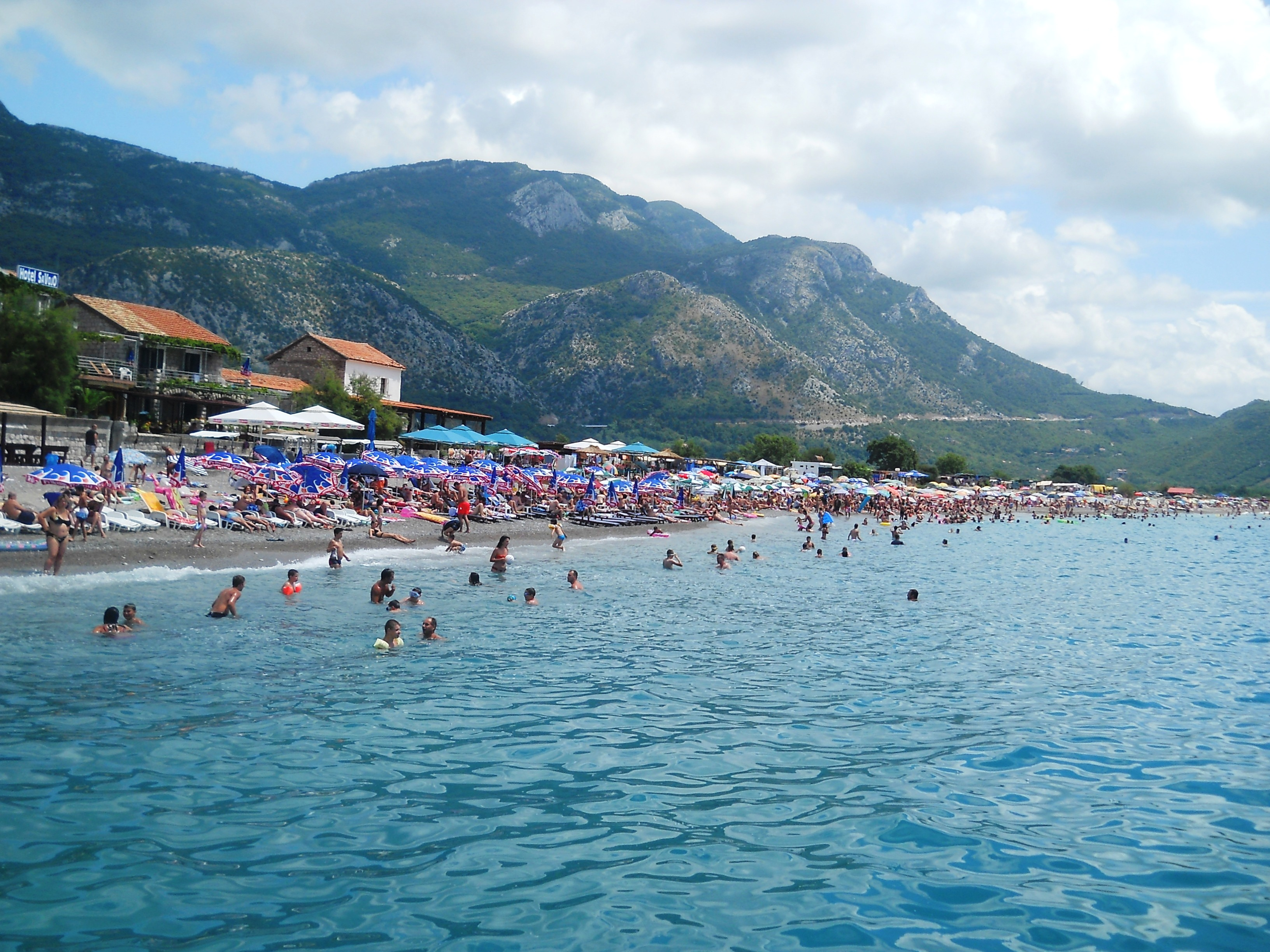 Буљарица, Црна Гора.